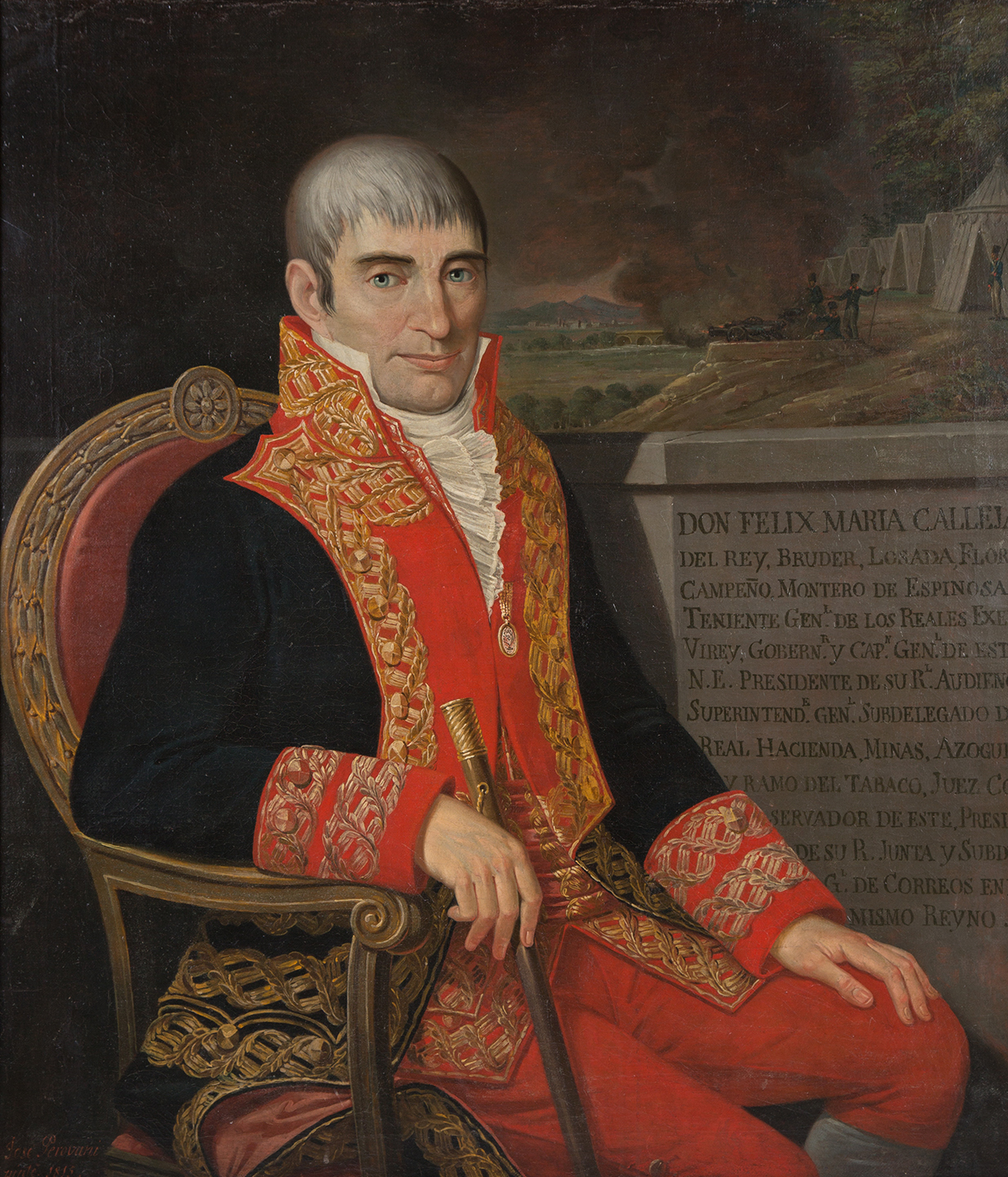 Retrato del Virrey Félix María Calleja (1753-1828)